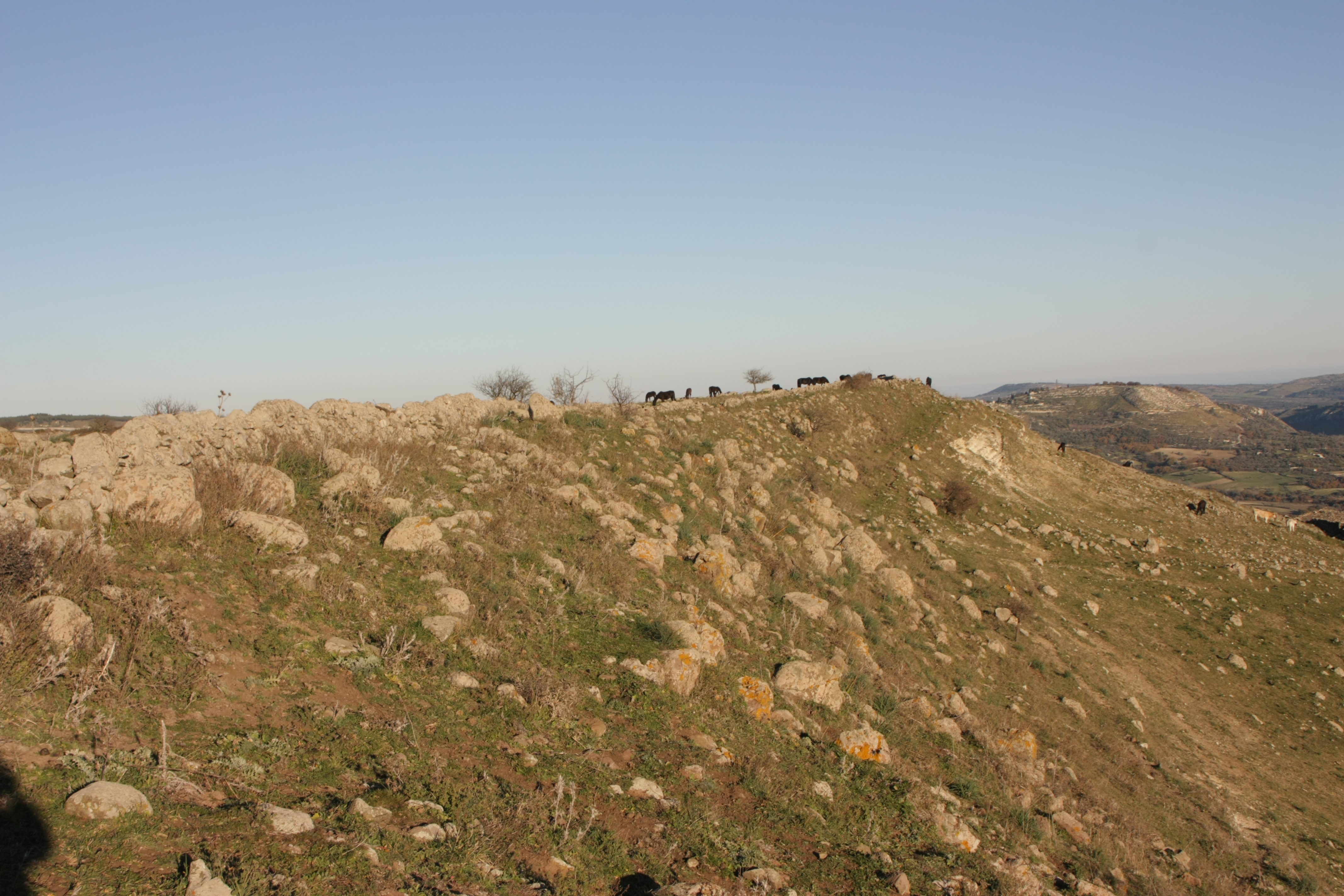 Monte Casale